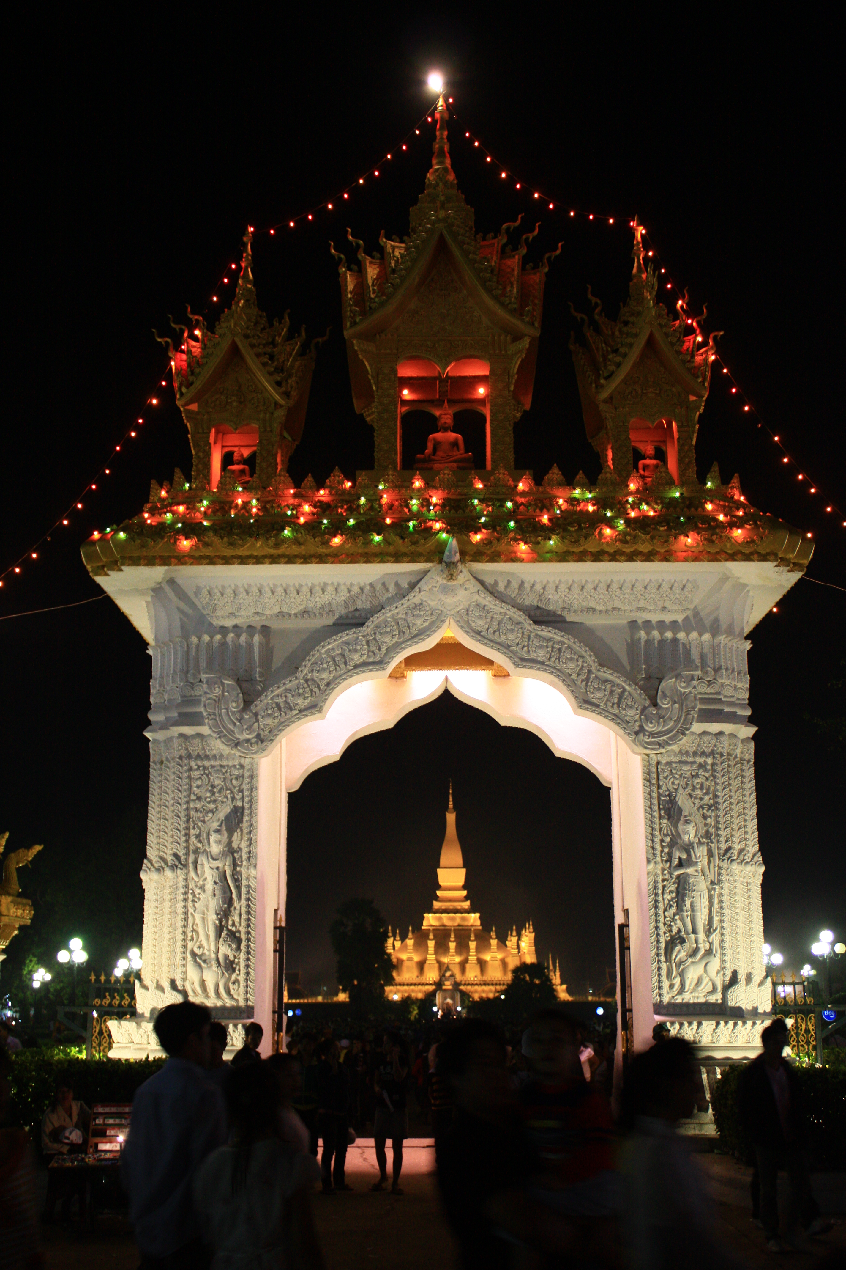 That Luang Fesztivál (Laosz, Ázsia)